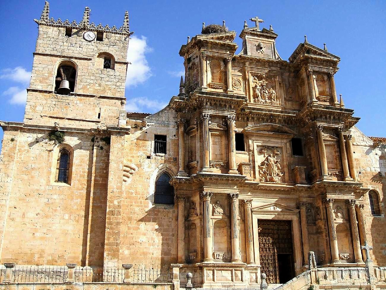 Iglesia de Nra. Sra. de la Asunción, Gumiel de Izán (Burgos)